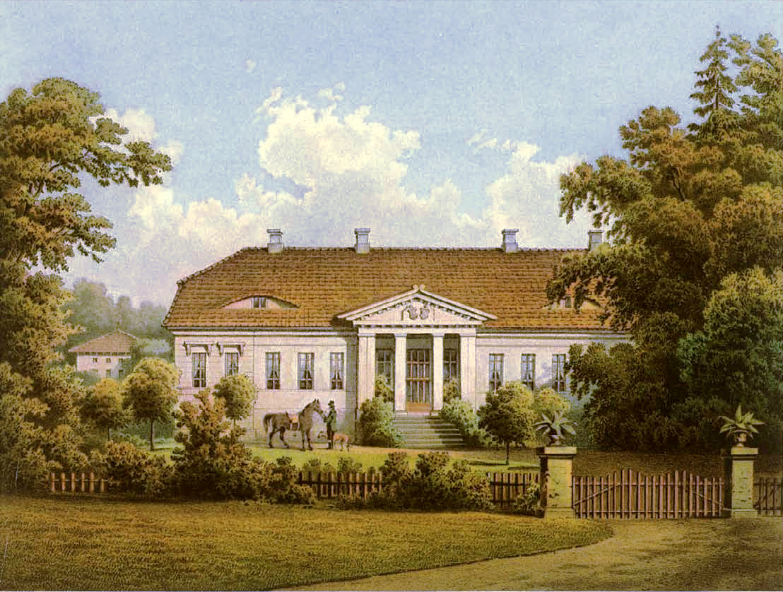 Rittergut Cammer, Kreis Zauche-Belzig, Provinz Brandenburg